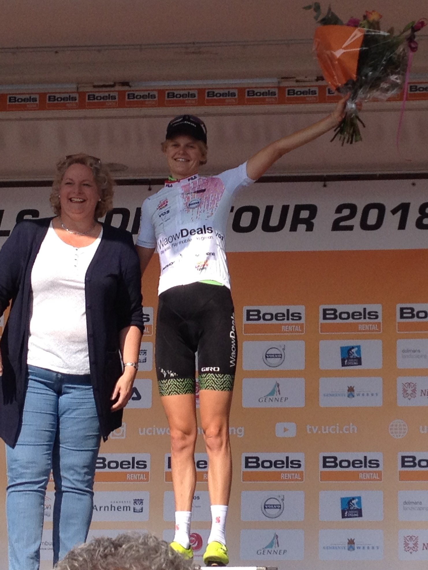 5e etappe van de Boels Ladies Tour 2018 door Zuid-Limburg, finish in Sittard op het Tom Dumoulin Bike Park. Jeanne Korevaar in de jongerentrui.